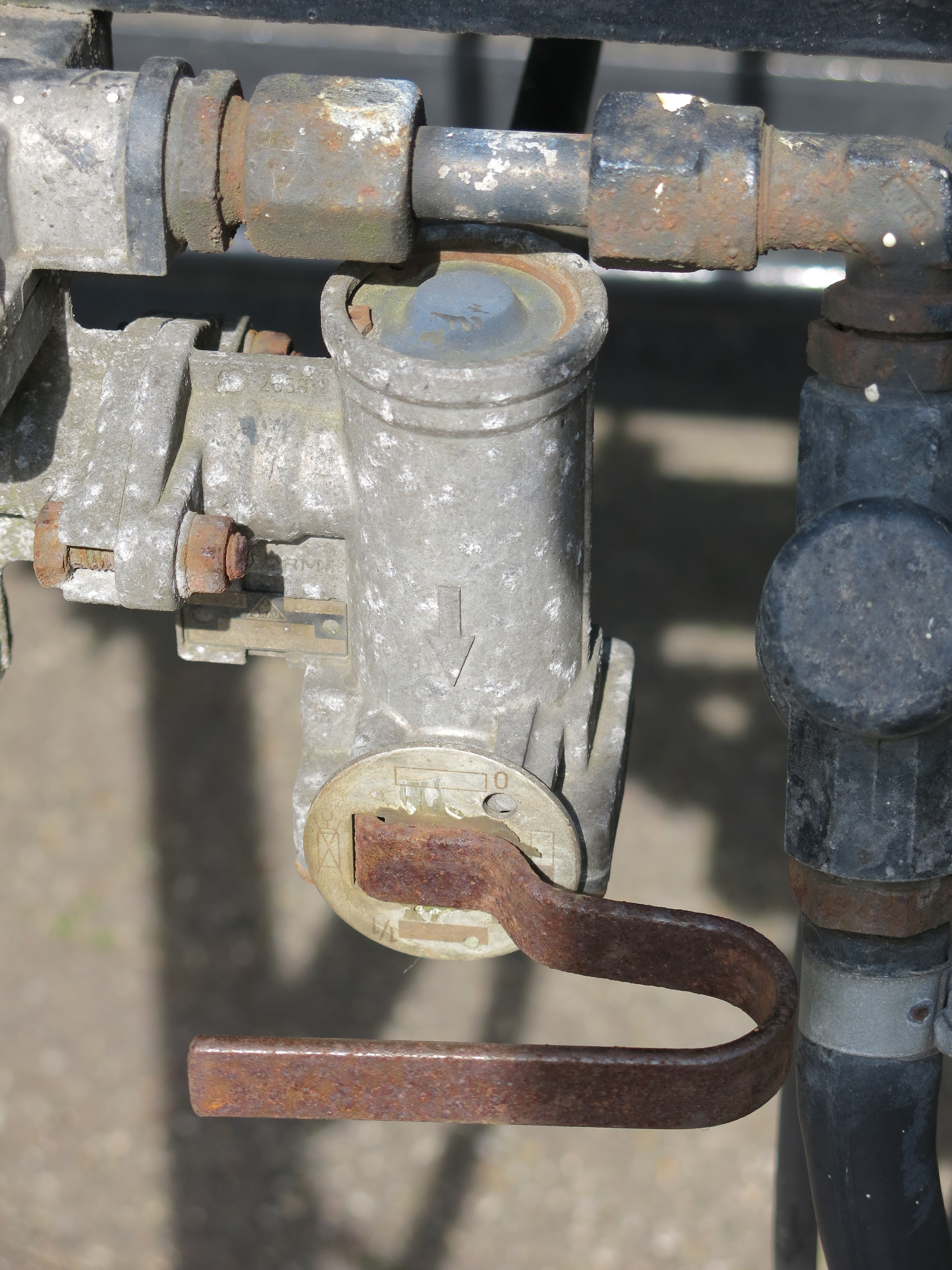 mauneller Bremskraftregler an einem Anhänger in der Landwirtschaft. In der Position "Halb". 12 Uhr = Leer, 6 Uhr = Voll, 9 Uhr = Lösen.